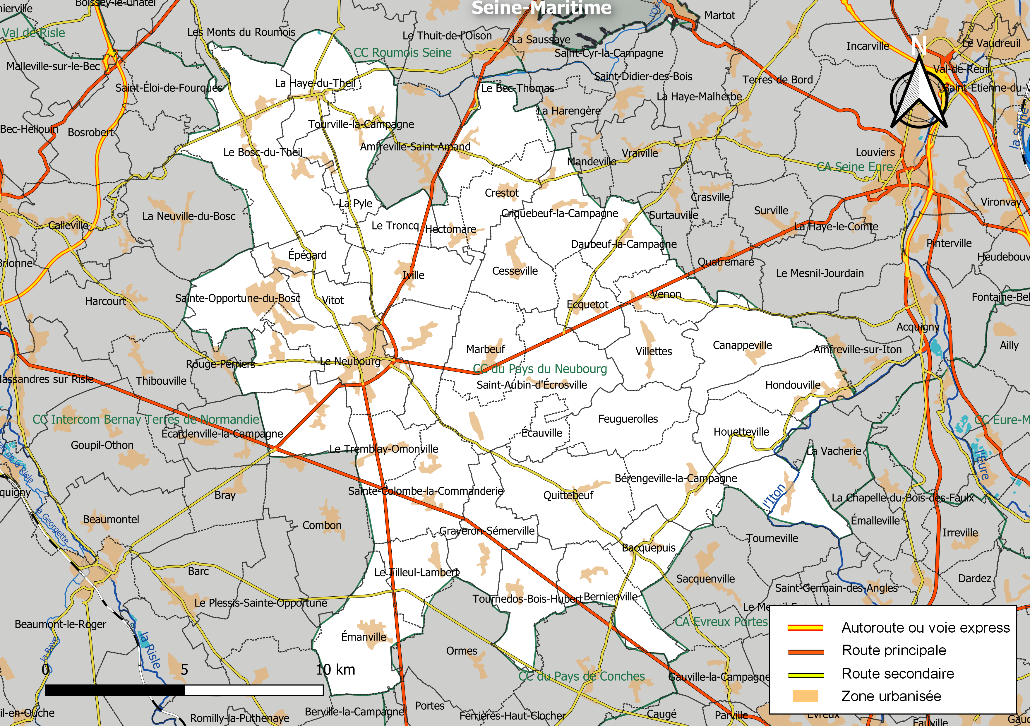 Carte géographique de la Communauté de communes du Pays du Neubourg, département de l'Eure, France. Composition au 1er janvier 2019.